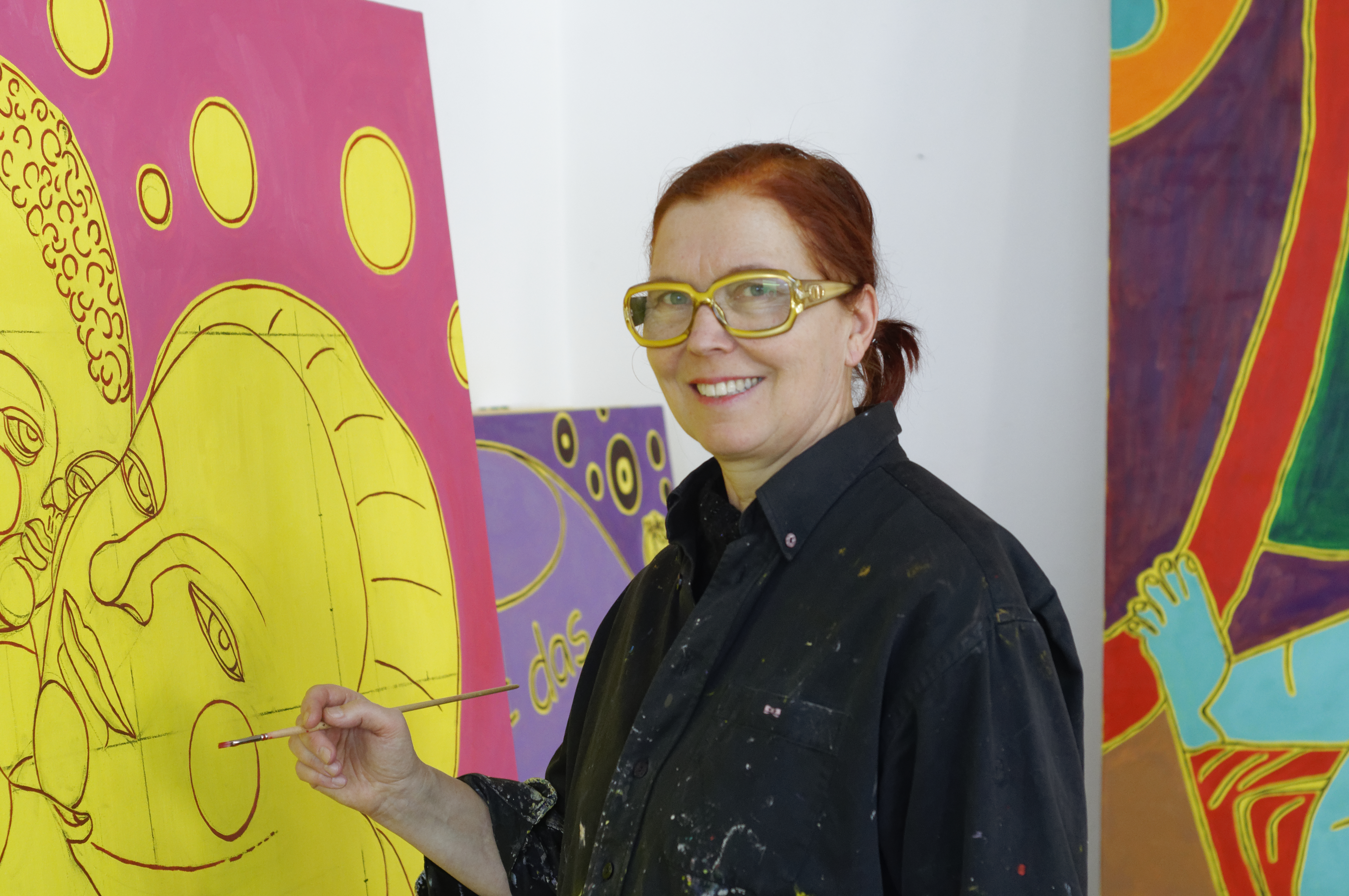 Bilder aus der Galerie von Eva Bur am Orde 2020 mit dem Schwerpunkt ornamentaler und figurativer Darstellungen.